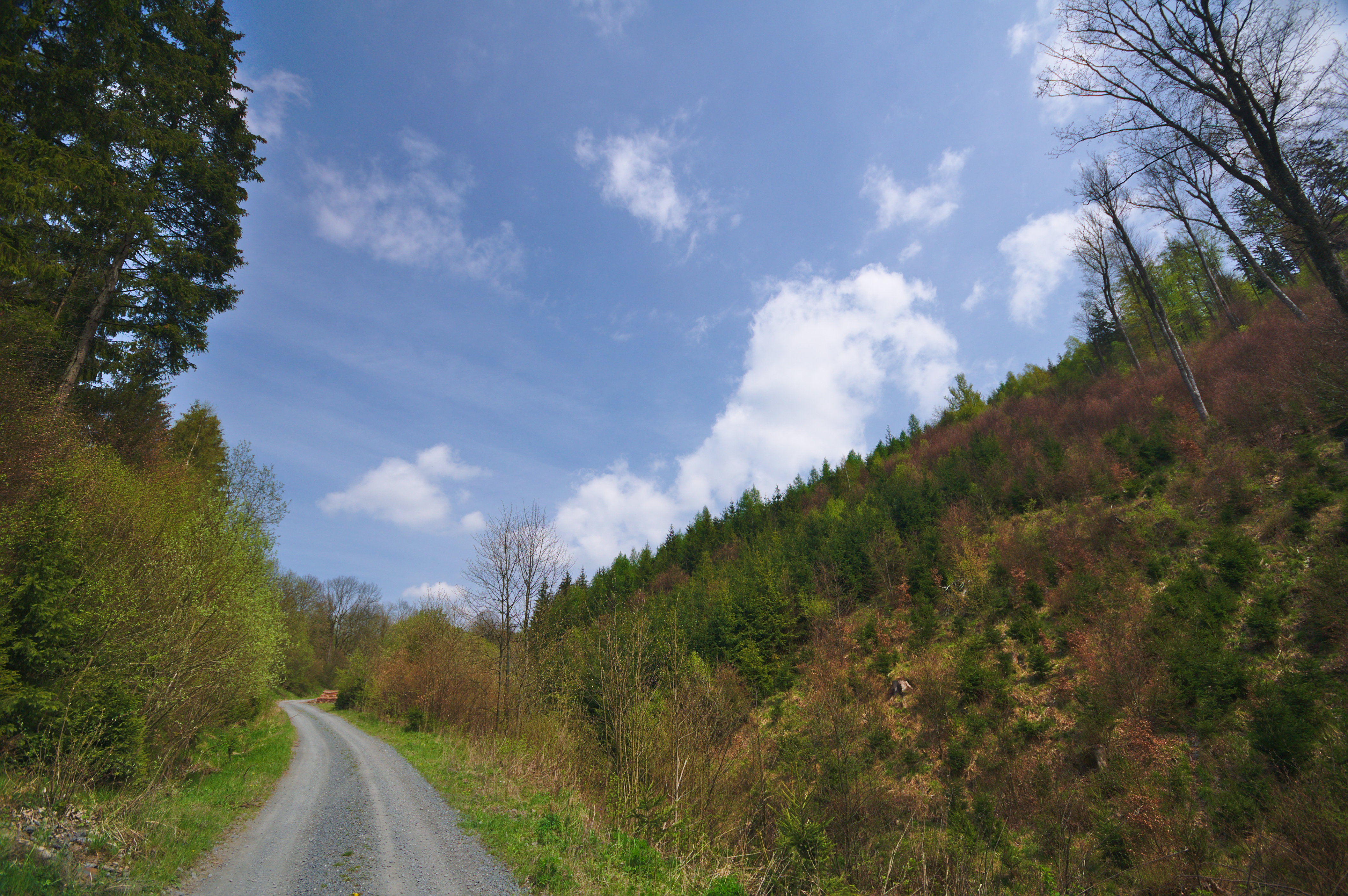 Vojenský újezd Libavá, okres Olomouc